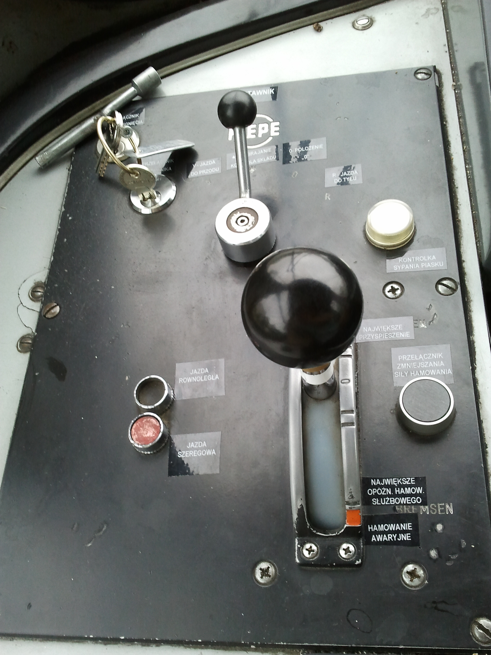 Zadajnik jazdy w wagonach GT8S.